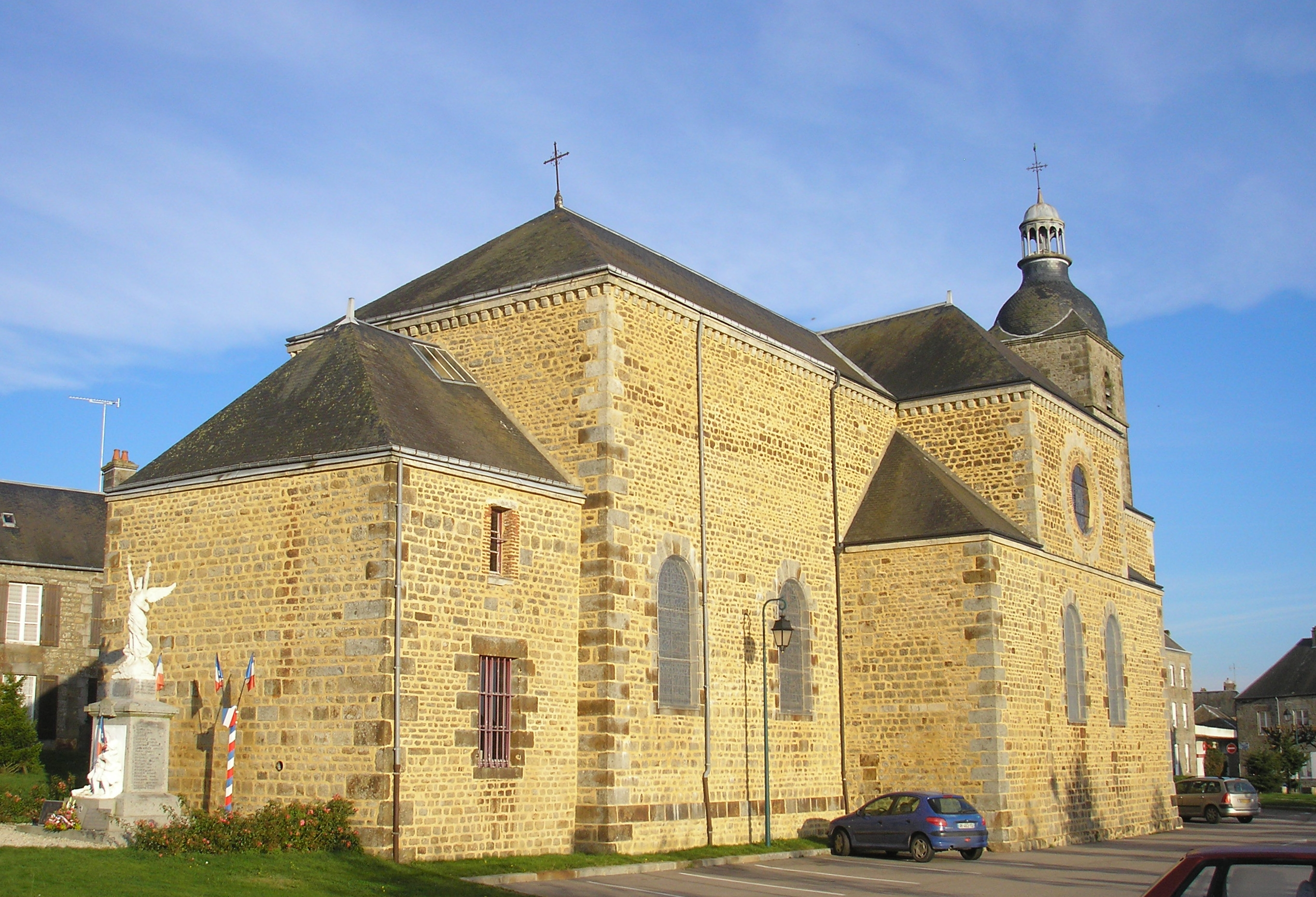 Carrouges (Normandie, France). L'église Notre-Dame.